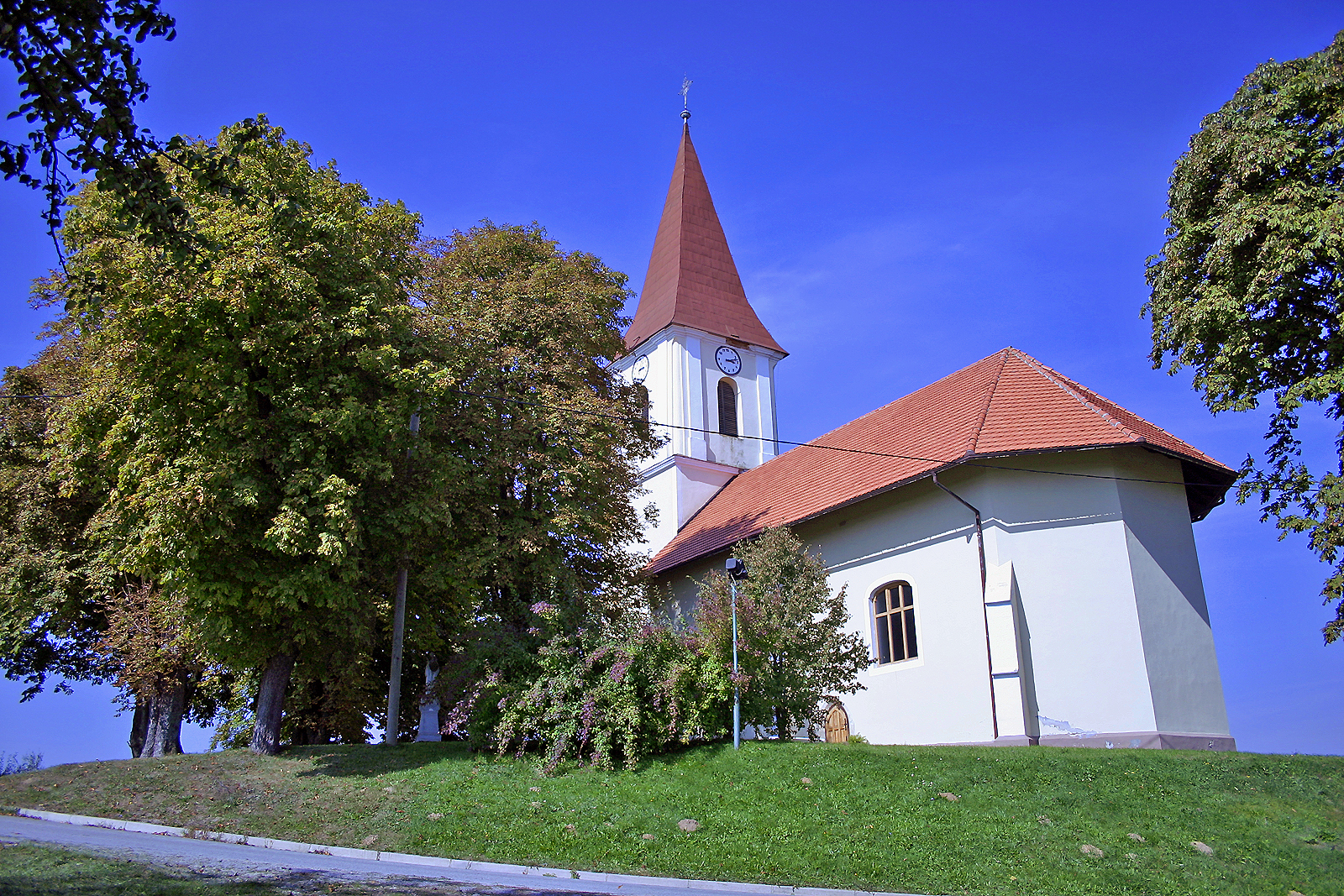 Cerkev svetega Nikolaja, Dolenci. Saint Nicholas church, Dolenci.. Heiliger Nikolaus Kirche, Dolenci..